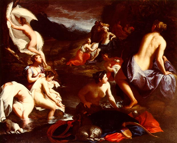 Diana en el baños con sus ninfastitle QS:P1476,es:"Diana en el baños con sus ninfas" label QS:Les,"Diana en el baños con sus ninfas"